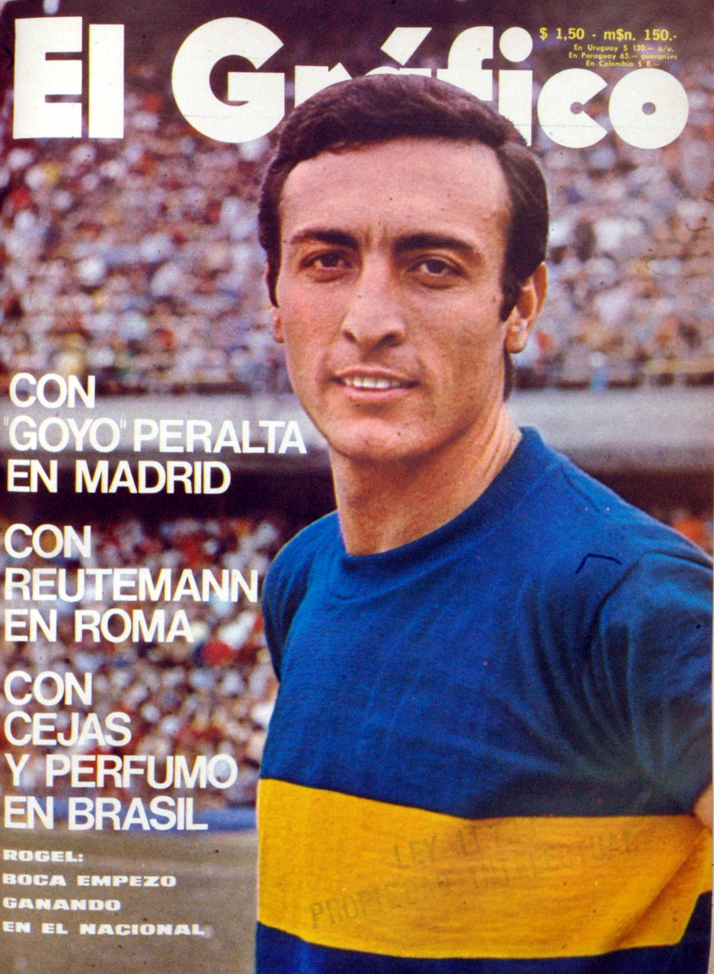 El Grafico del 12 de Octubre de 1971. Edicion 2714